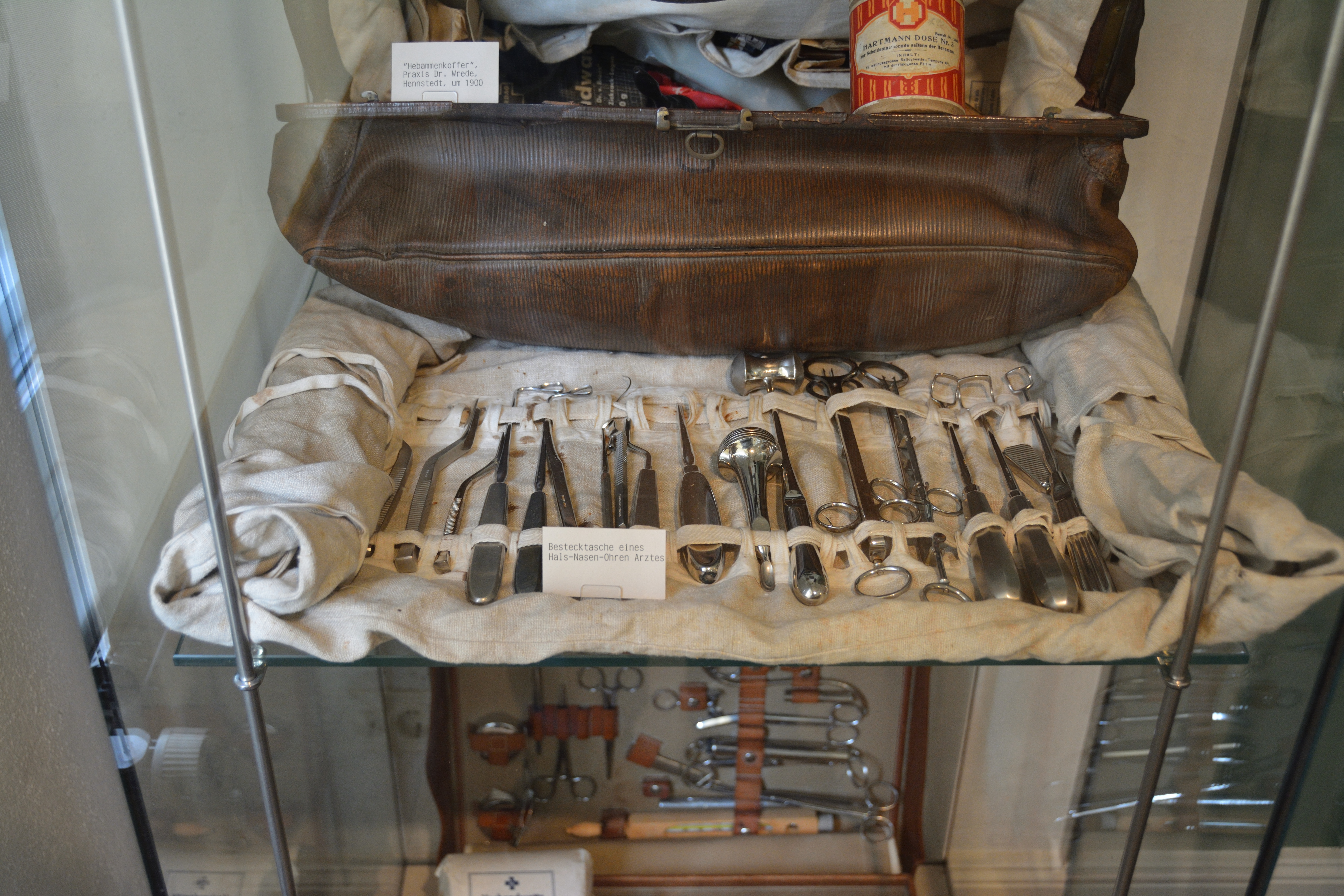 Impressionen aus dem Dithmarscher Landesmuseum Bestecktasche eines Hals-Nasen-Ohrenarztes